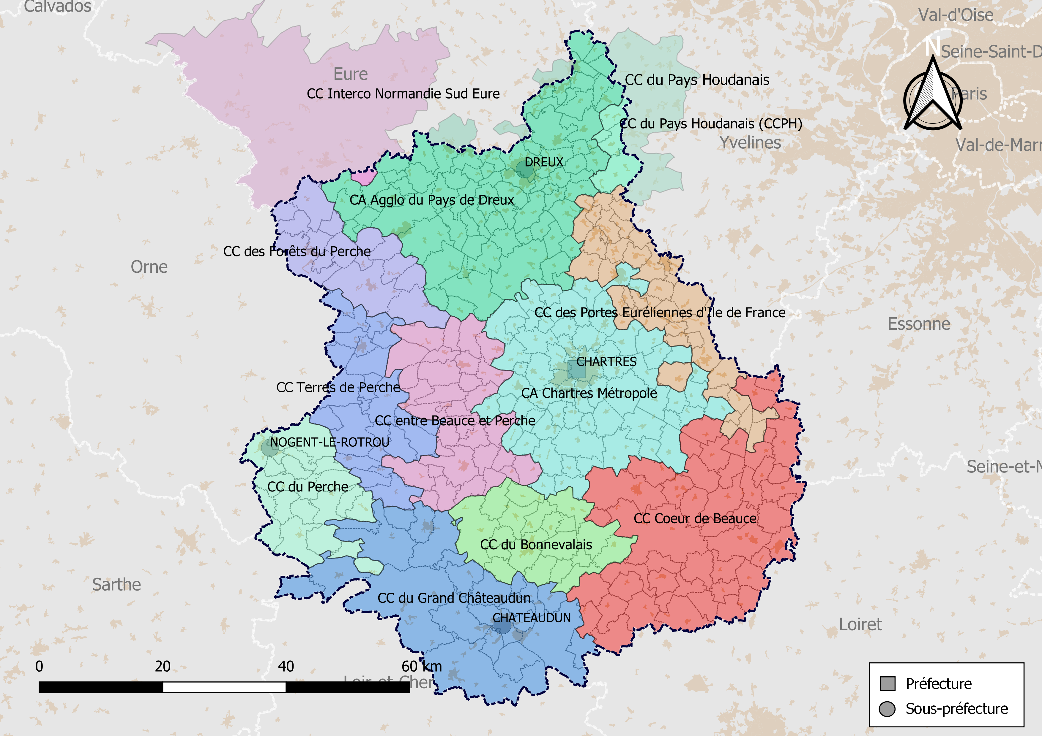 Carte des intercommunalités du département d'Eure-et-Loir, France. Composition au 1er janvier 2019.